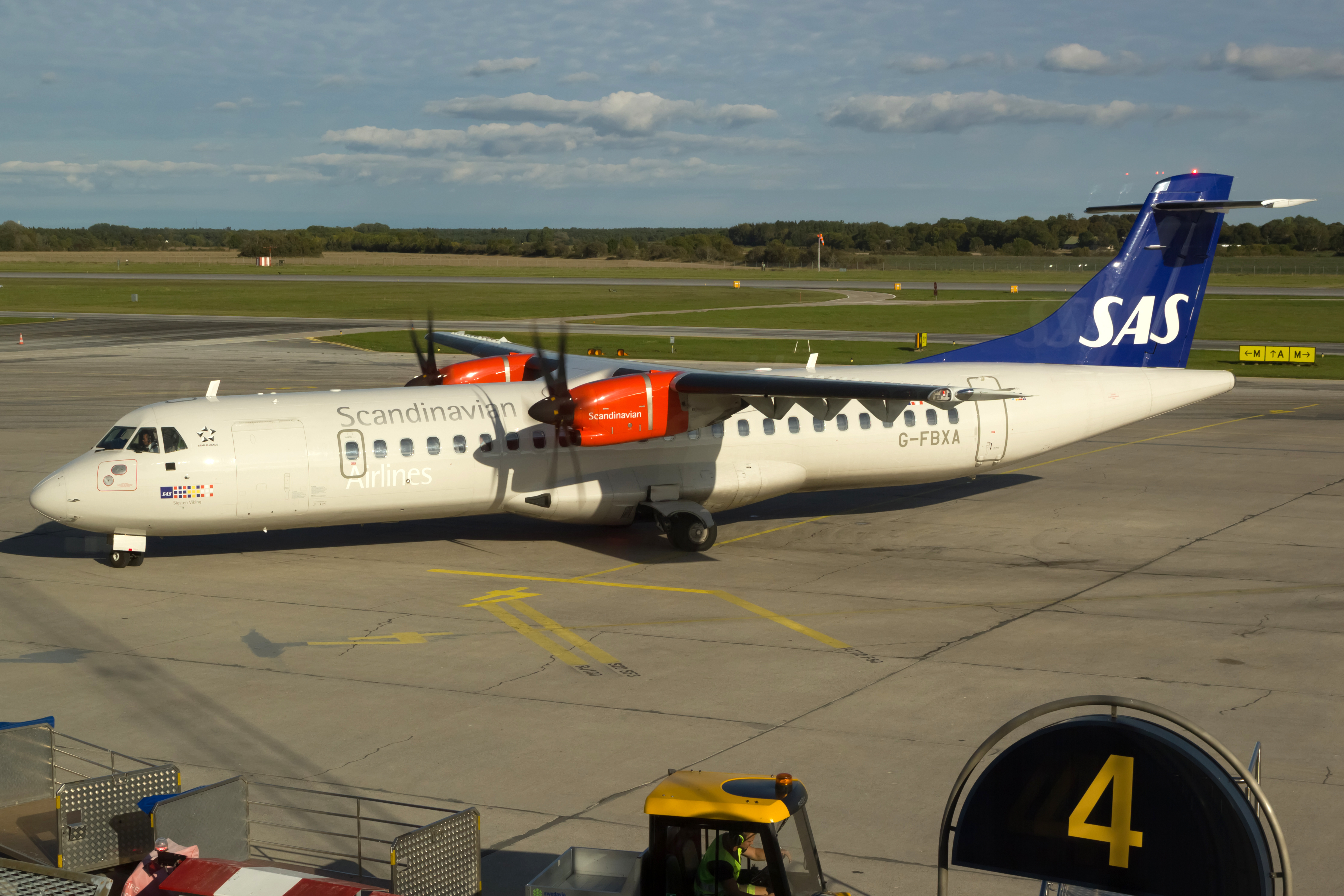 ATR 72 de SAS no aeroporto de Visby.